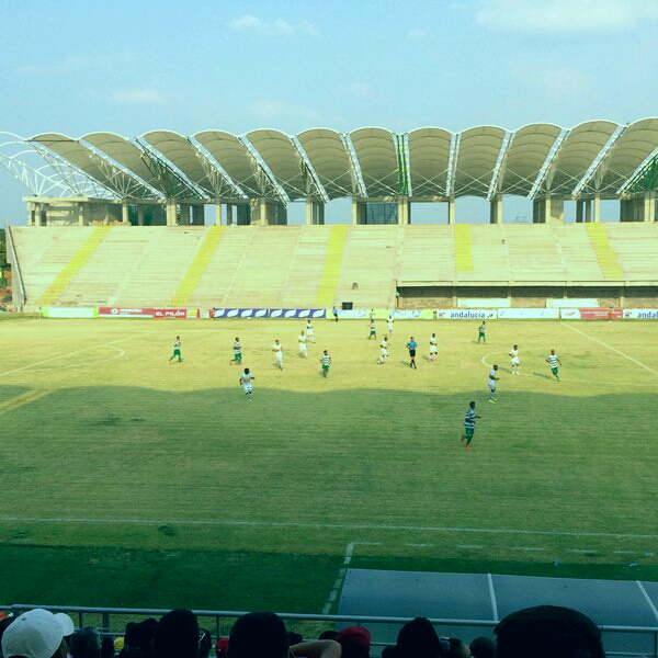 Vista del estadio Del Valledupar F.C